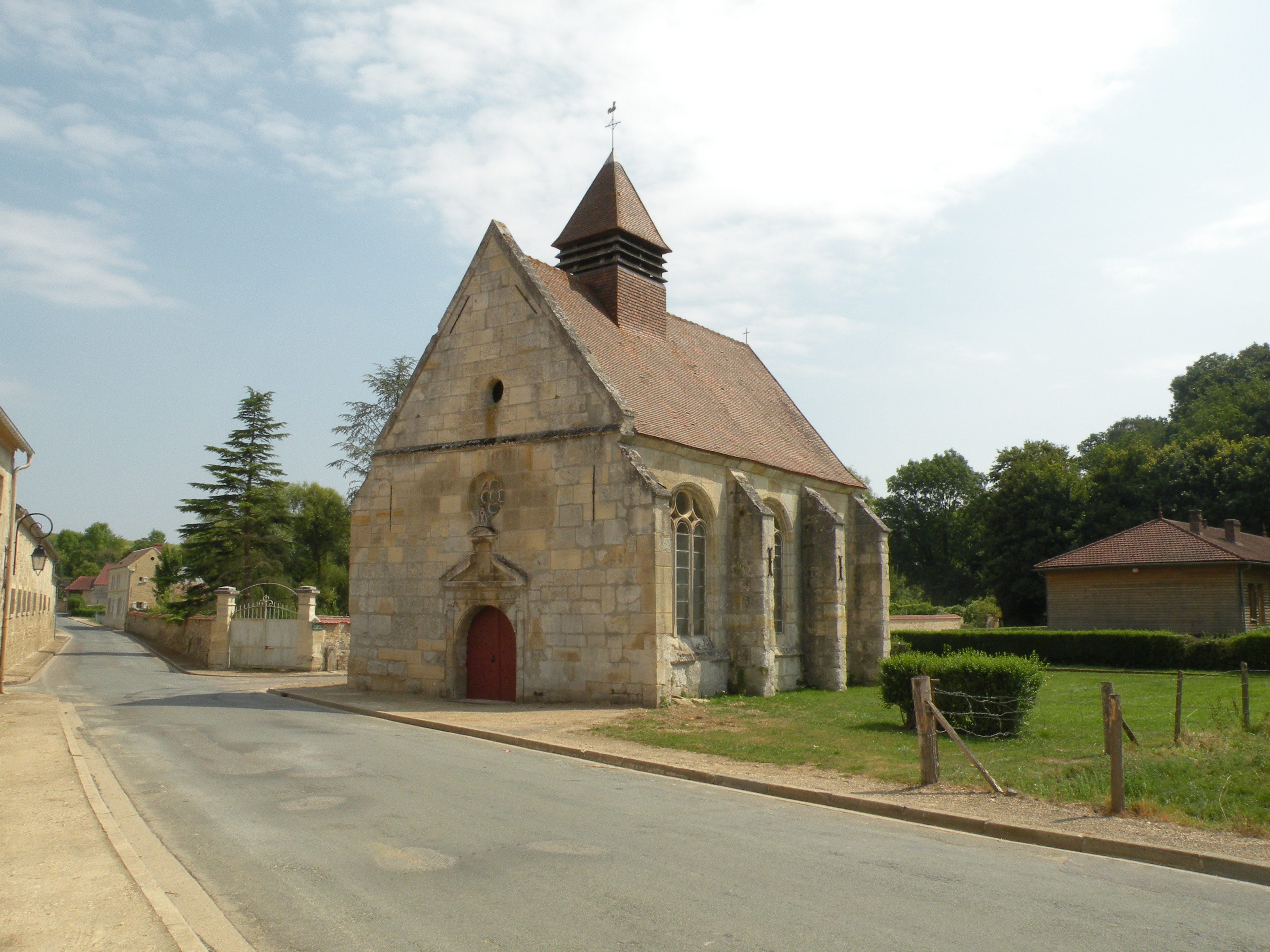 eglise de Theuville, val d'oise, france